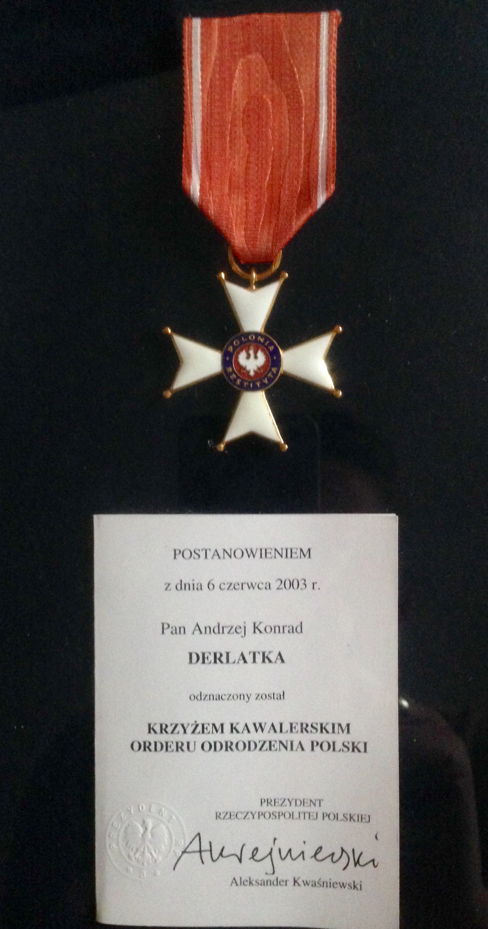 Krzyż Kawalerski Orderu Odrodzenia Polski nadany w dn. 06.06.2003 r. przez Prezydenta Aleksandra Kwaśniewskiego (za opracowanie i wdrożenie w 2002 r. koncepcji reformy służb specjalnych oraz w szczególności kierowanie tworzeniem w okresie od grudnia 2001 do czerwca 2002 instytucji Agencji Wywiadu RP)